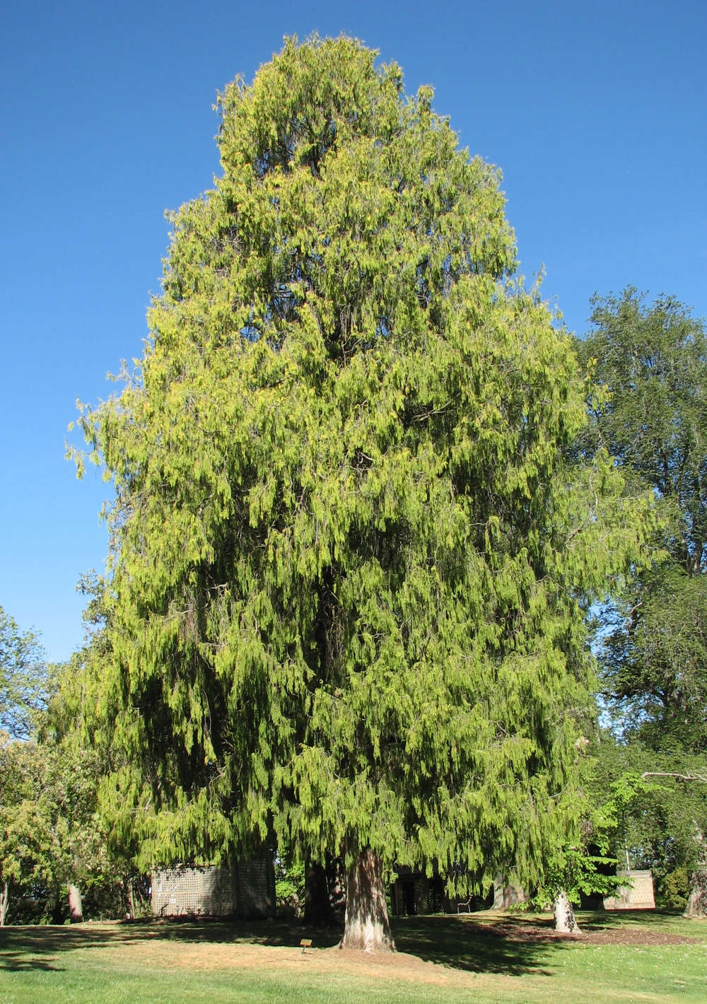 Cupressus funebris, Kyneton Botanic Gardens, Victoria, Australia.